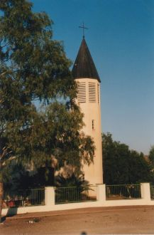 Die Kirche in Maltahöhe in Namibia. The Church of Maltahöhe, Namibia.